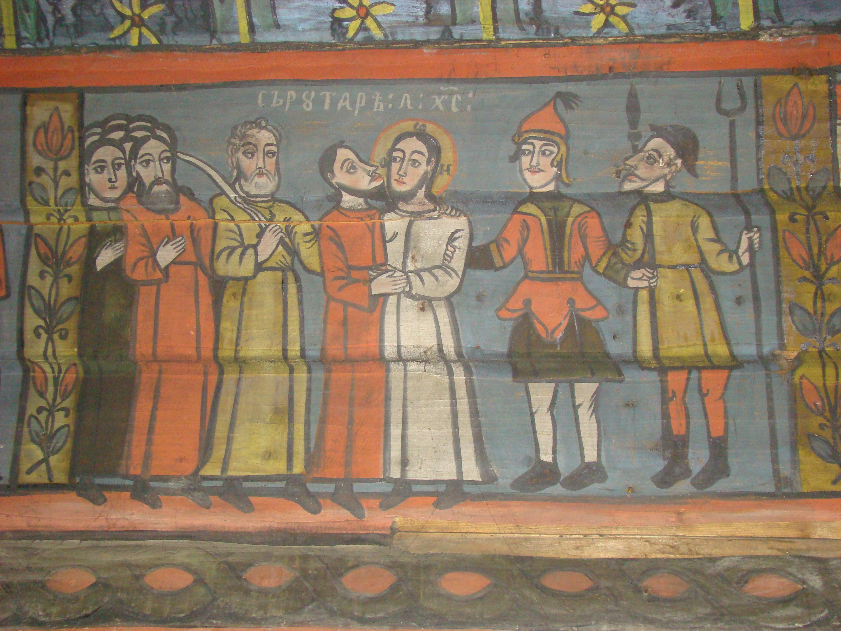 Biserica de lemn „Sf.Dumitru” din Păușa, județul Bihor